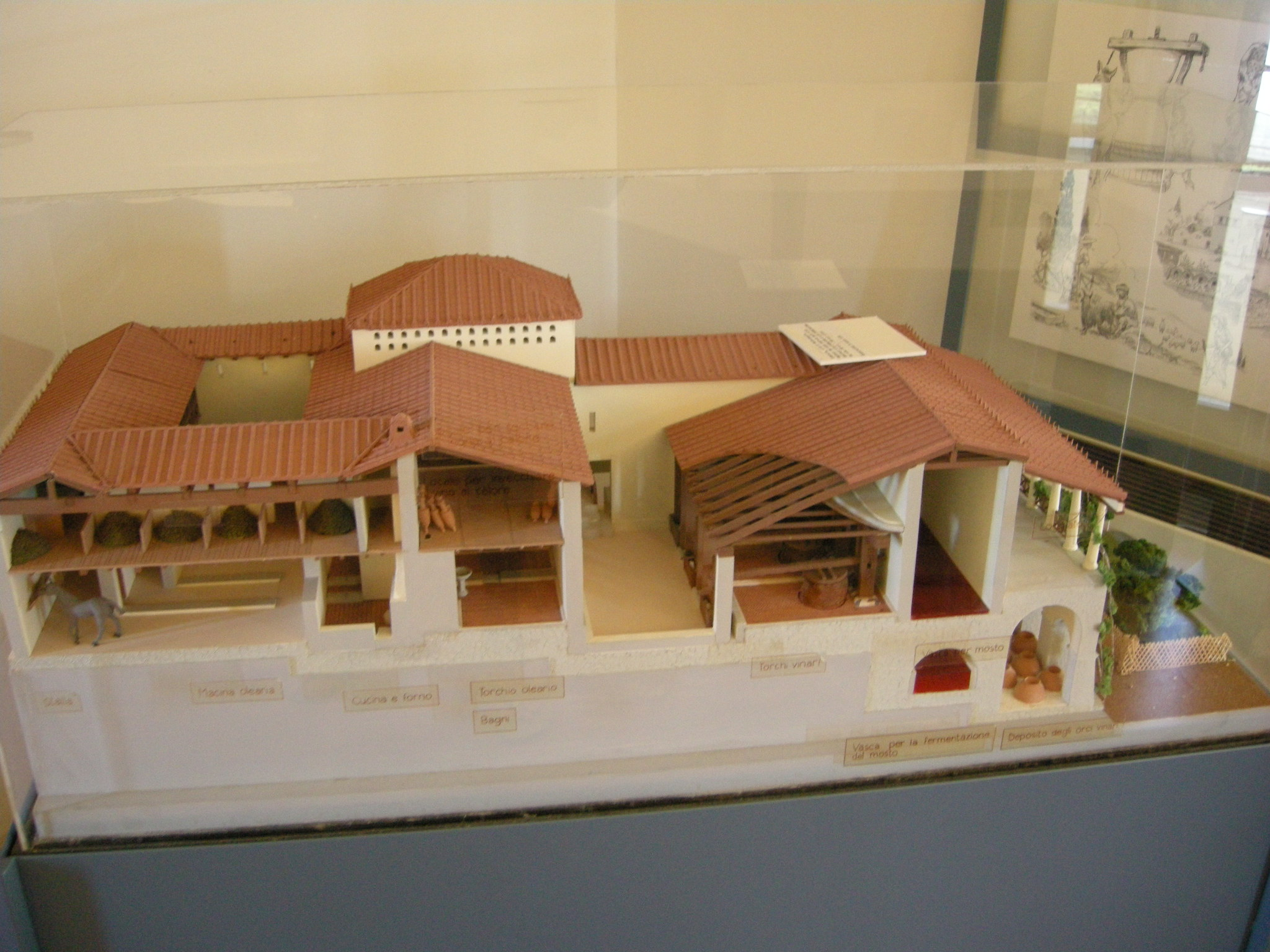 Museo archeologico di Rosignano Marittimo, ricostruzione della villa di settefinestre a orbetello